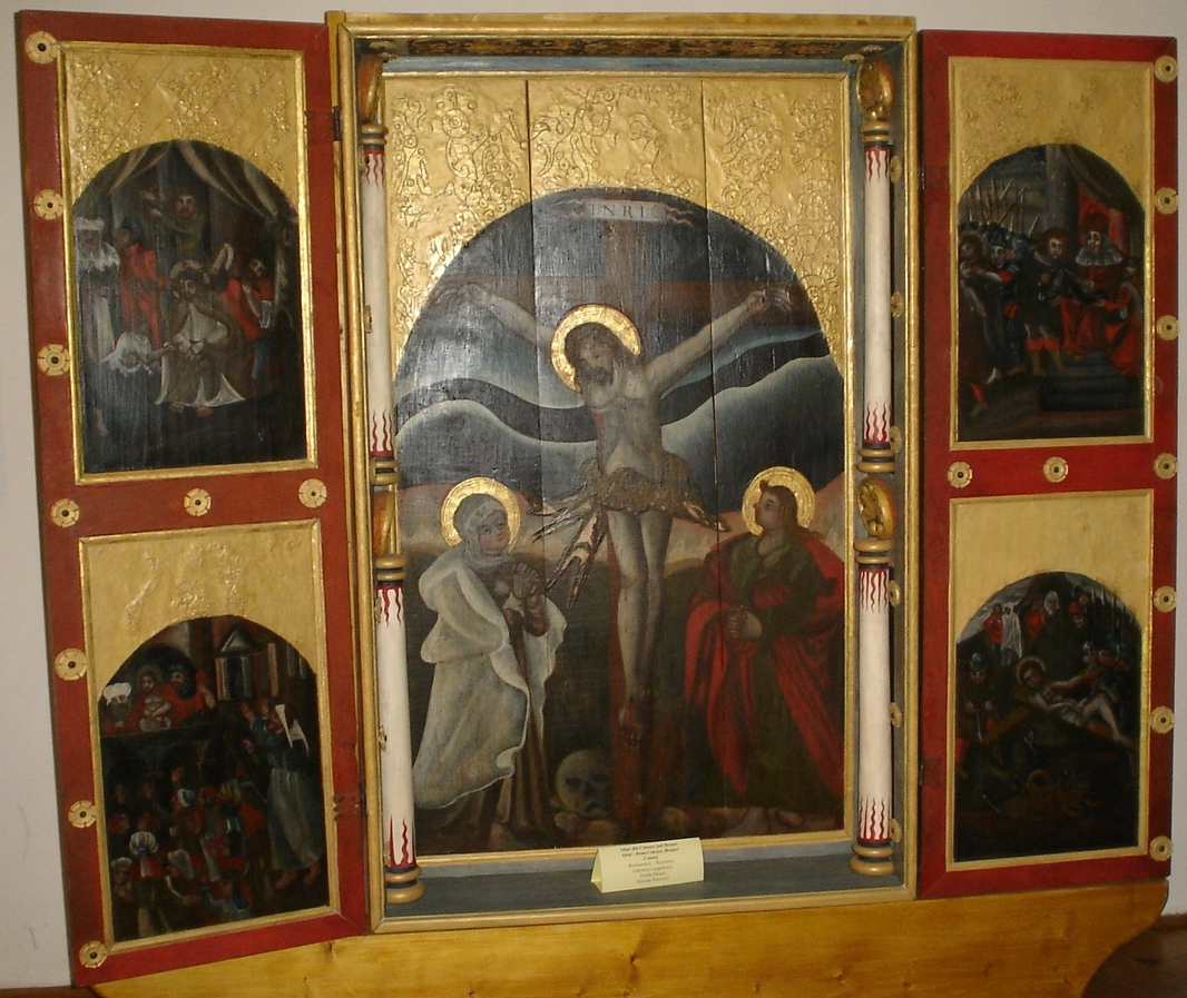 Altarul triptic al bisericii fortificate din Cincsor.